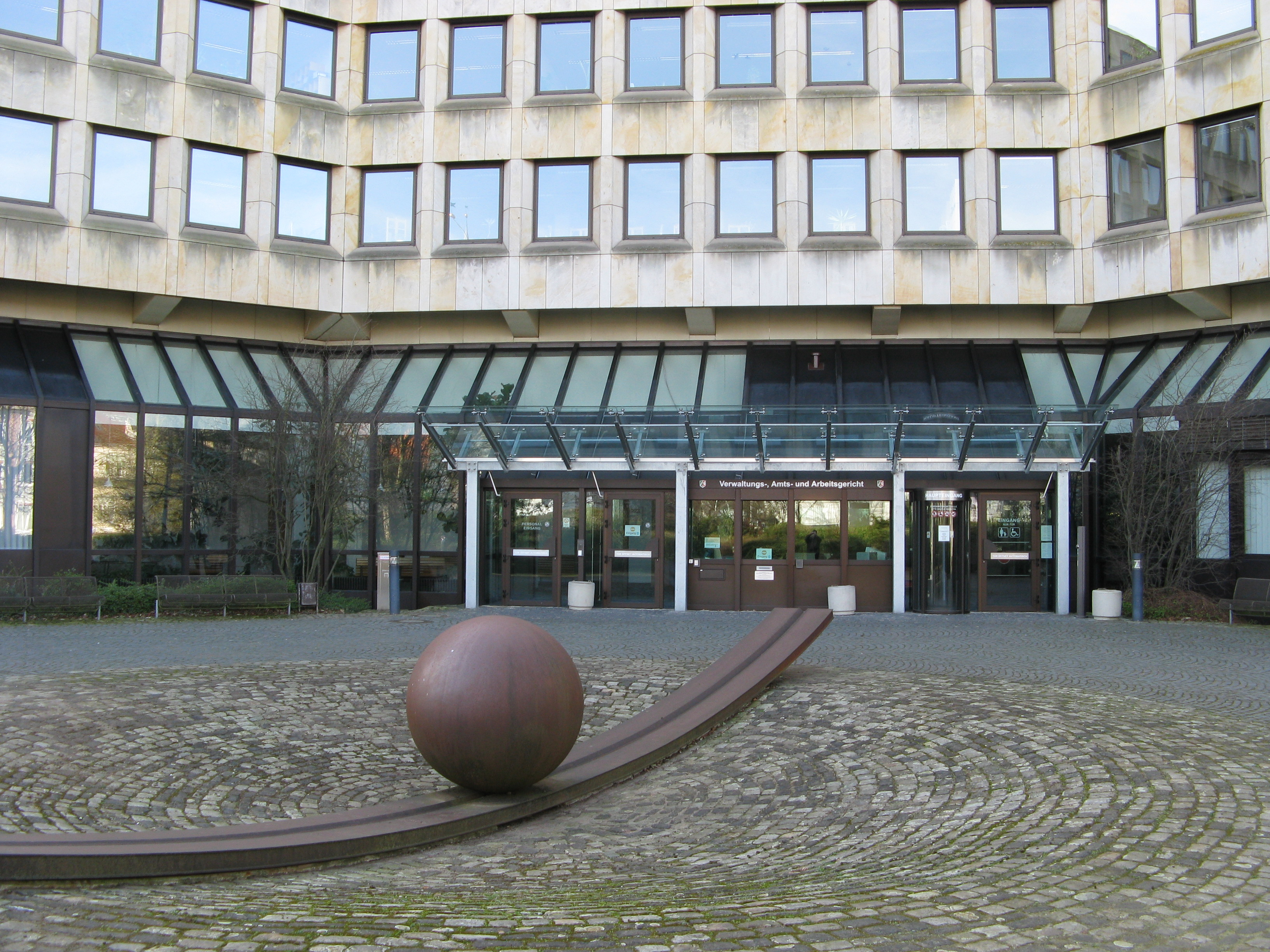 Eingang des Justizzentrums in Minden, Nordrhein-Westfalen. Sitz des Amtsgerichts Minden und Verwaltungsgerichts Minden.